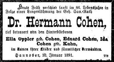 Todesanzeige mit folgendem Inhalt: „Heute Früh verschied sanft im 86. Lebensjahre in Folge einer Lungenlähmung der Geh. San.-Rath Dr. Hermann Cohen tief betrauert von den Hinterbliebenen Ella Oppler geb. Cohen, Eduard Cohen, Ida Cohen geb. Kuhn im Namen ihrer Kinder und sämmtlicher Verwandten. Hannover, den 10. Januar 1891.“ ...